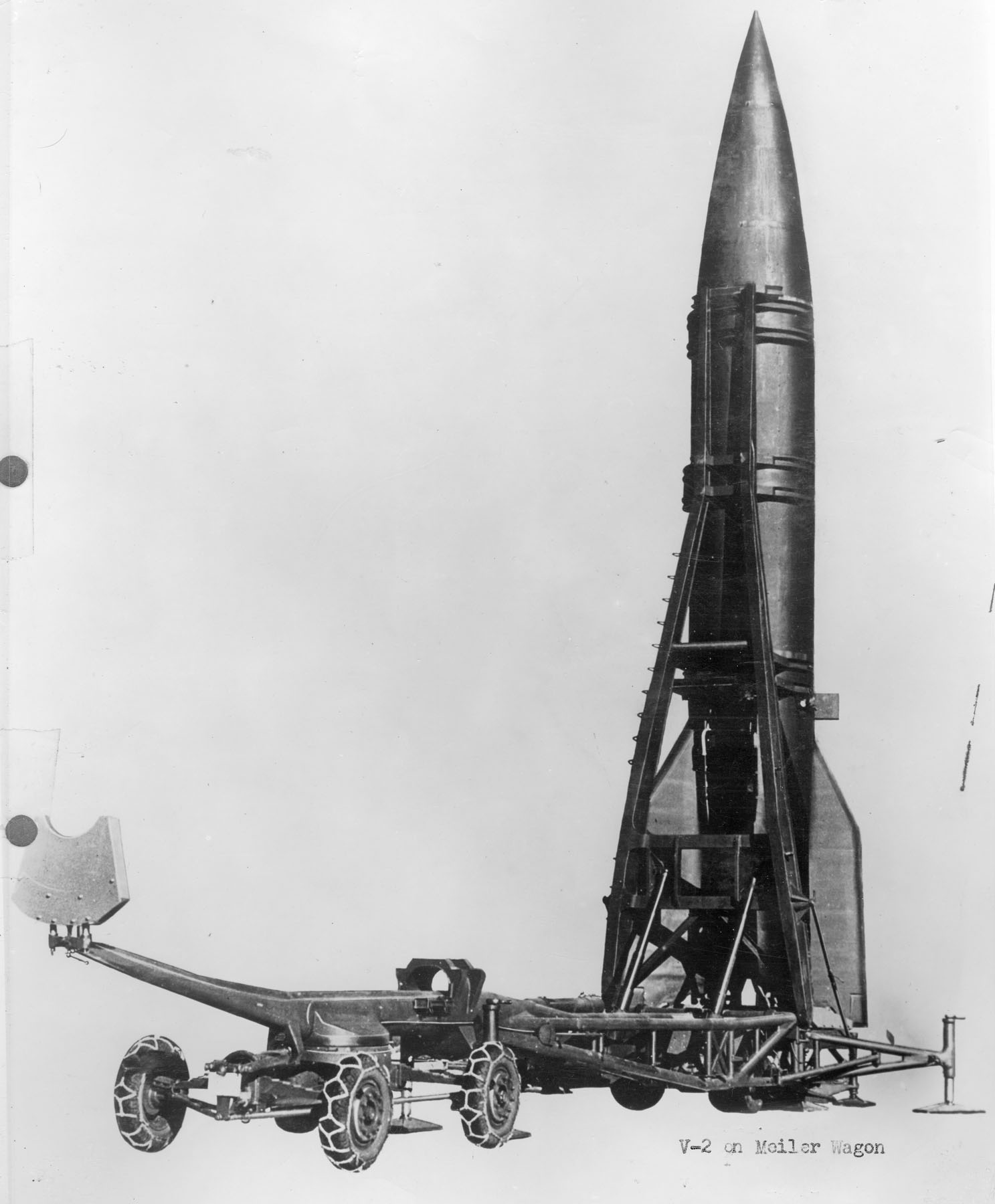 V2 Missile